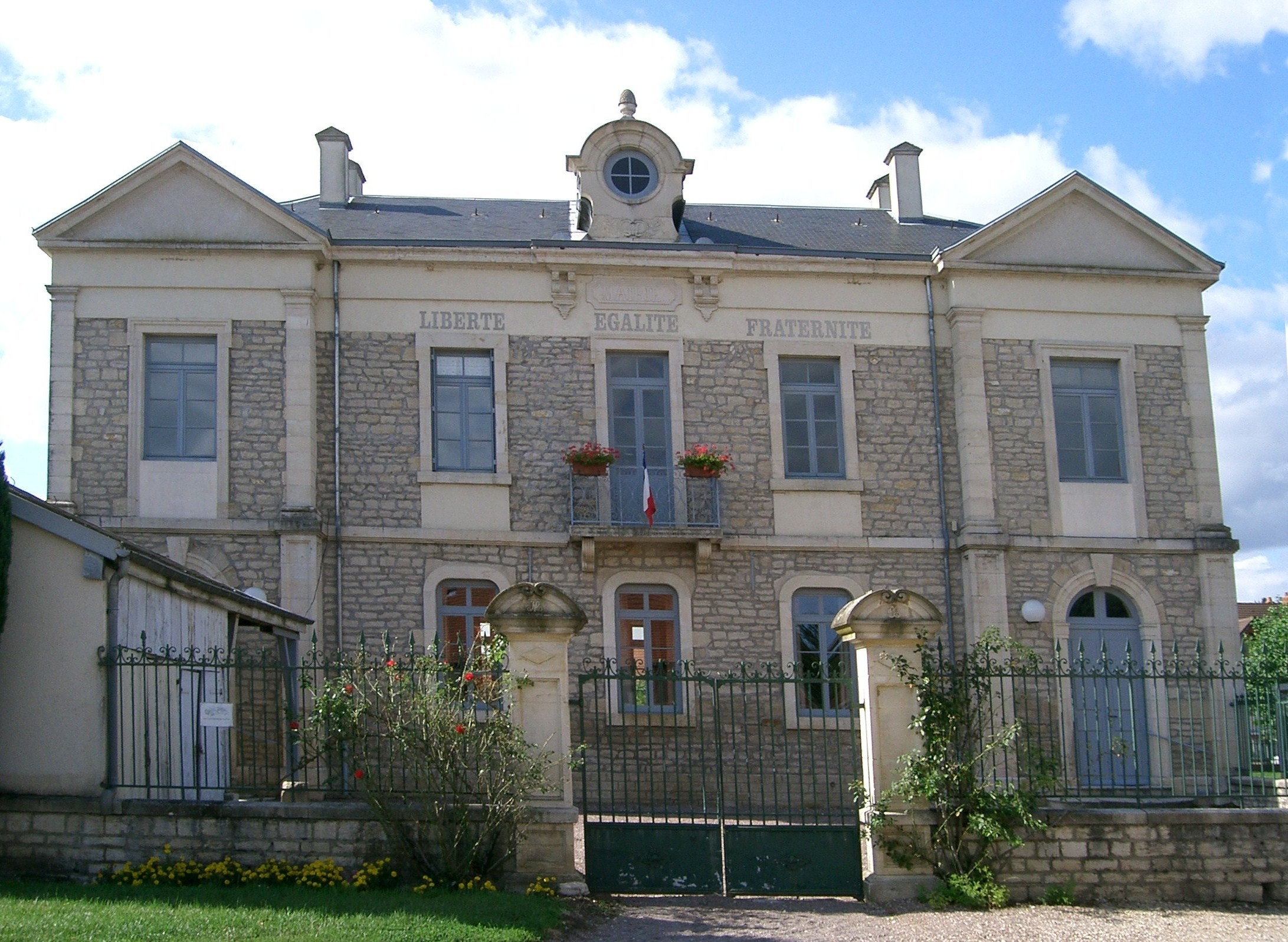 Village d'Ecuelles (Saône et Loire - France) - mairie -école